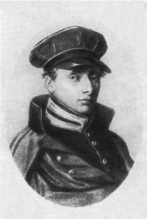 Vladimir Dal (1801-1872)